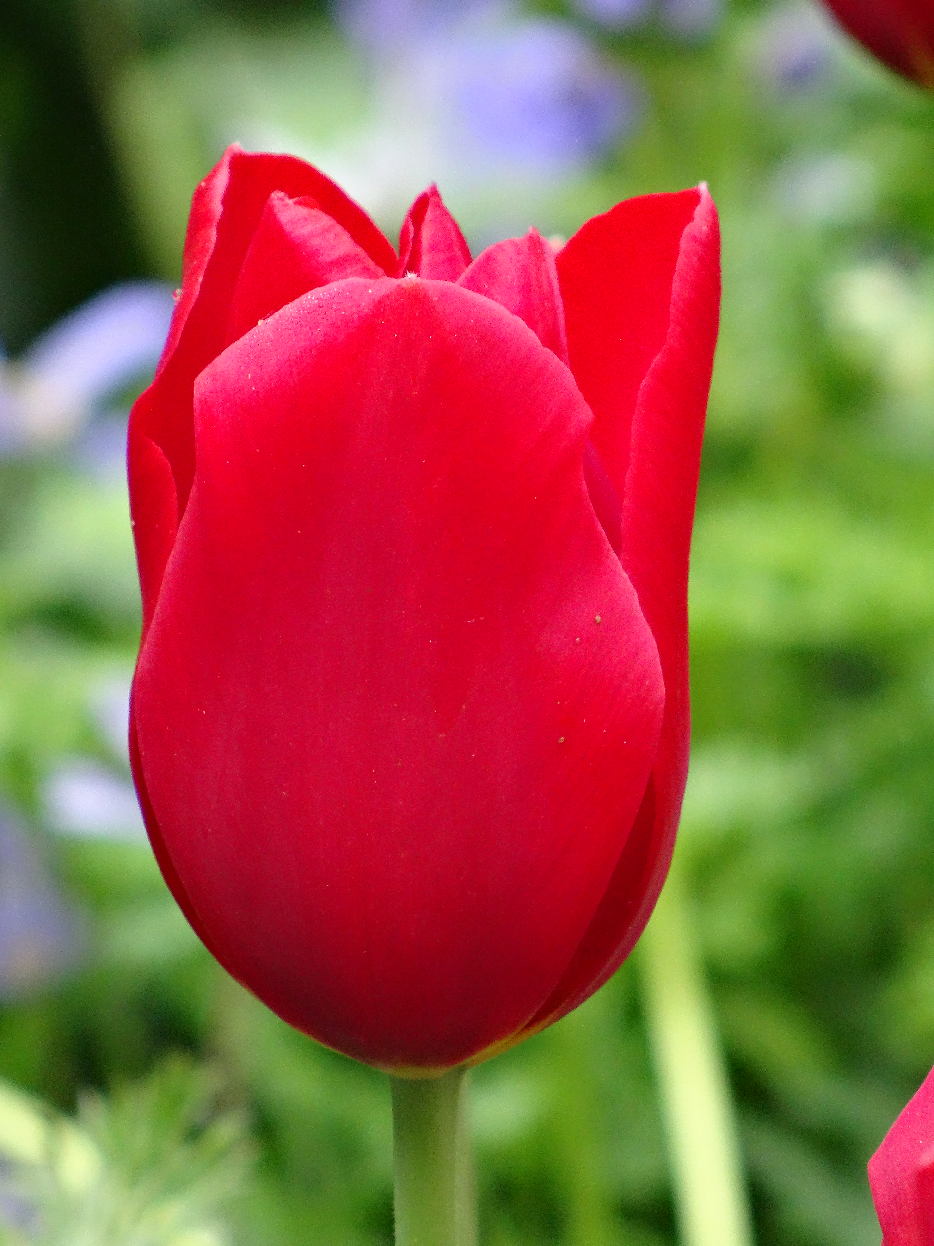 Foto de uma tulipa vermelha tirada do parque das flores na Holanda - Keukenhof em 28 de abril de 2014